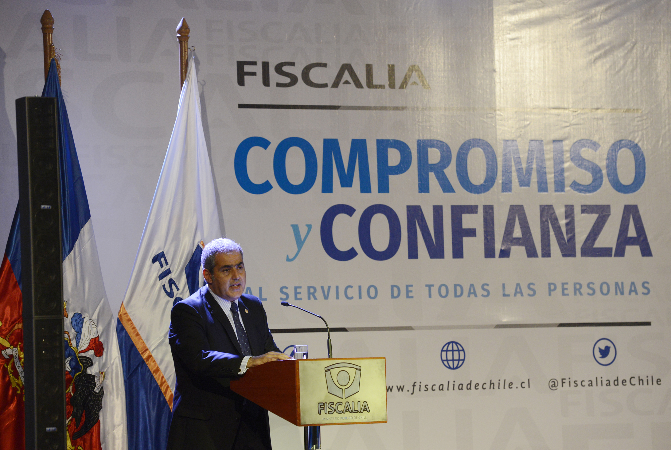 28/04/15 Ministro Álvaro Elizalde asiste a cuenta pública de la Fiscalía Nacional.